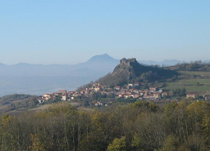 Yronde-et-Buron (Puy de Dôme, France) et le château de Buron (XIIIe siècle).